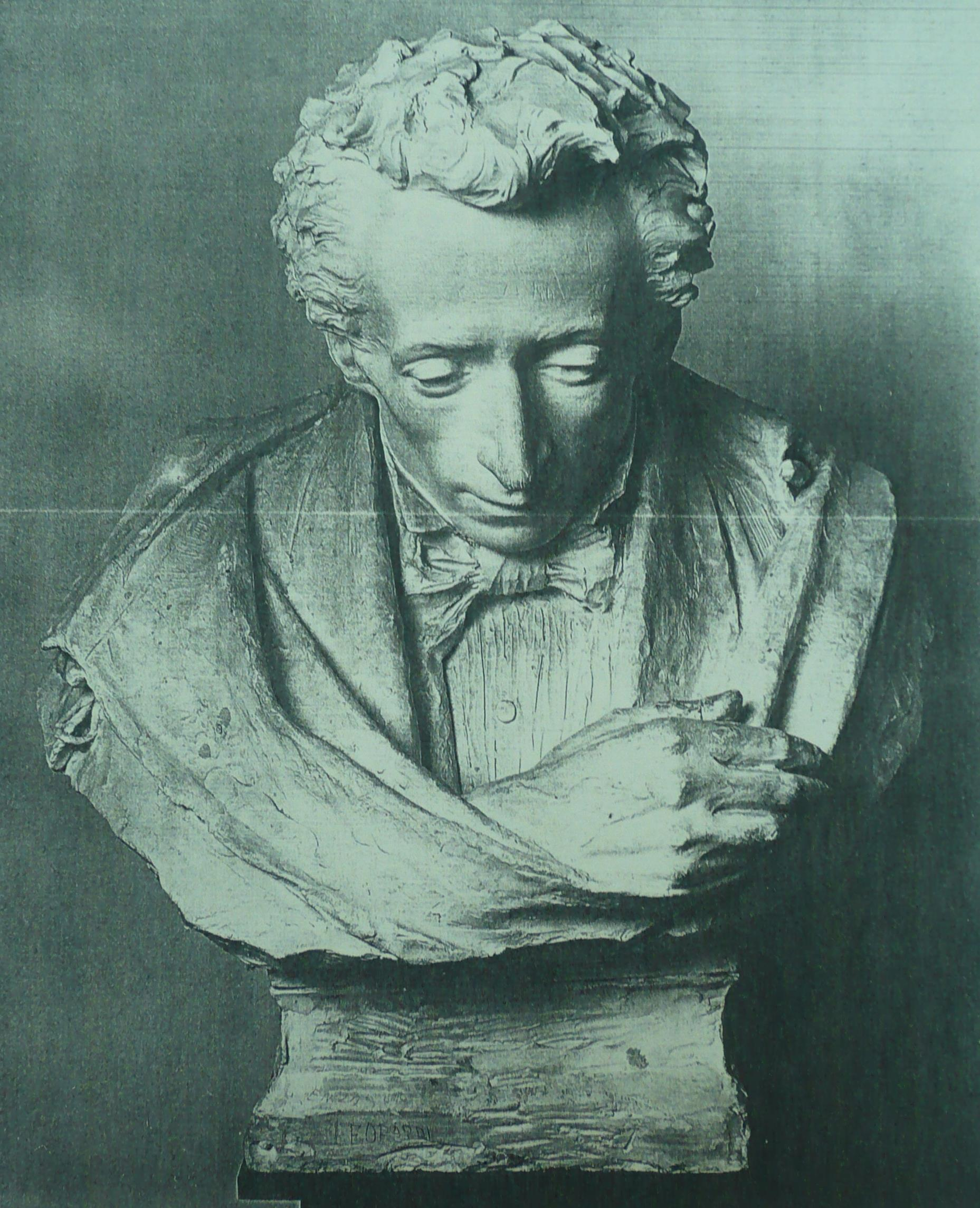 Uno dei due busti in marmo di Leopardi